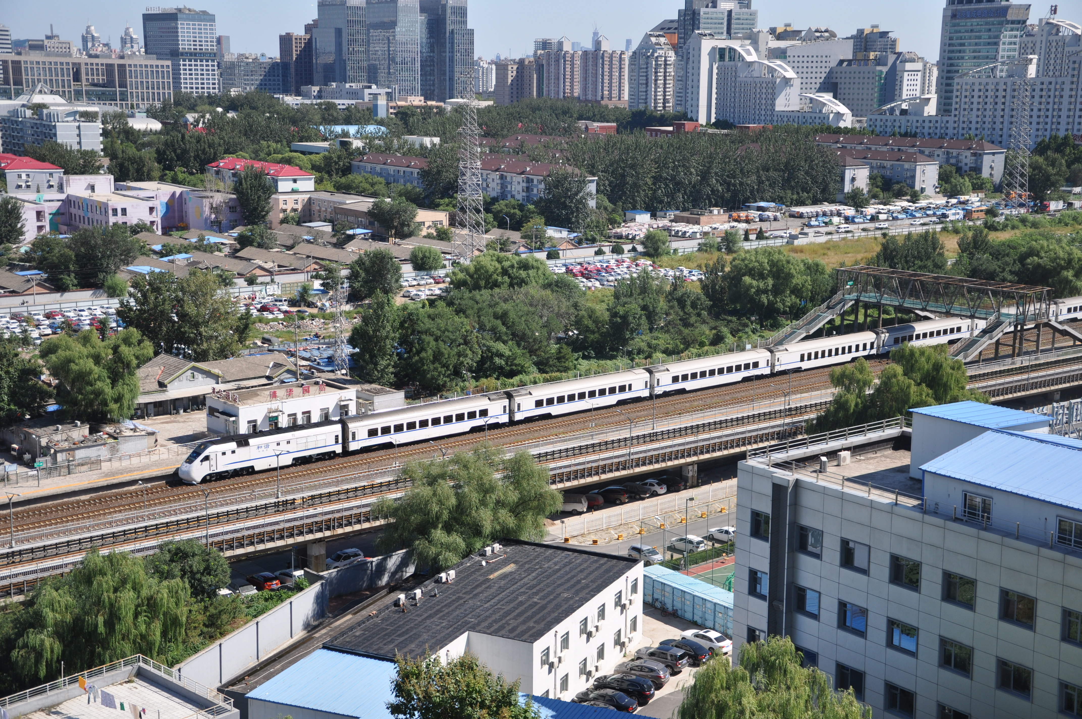 清华园站及S2线列车，摄于青年公寓